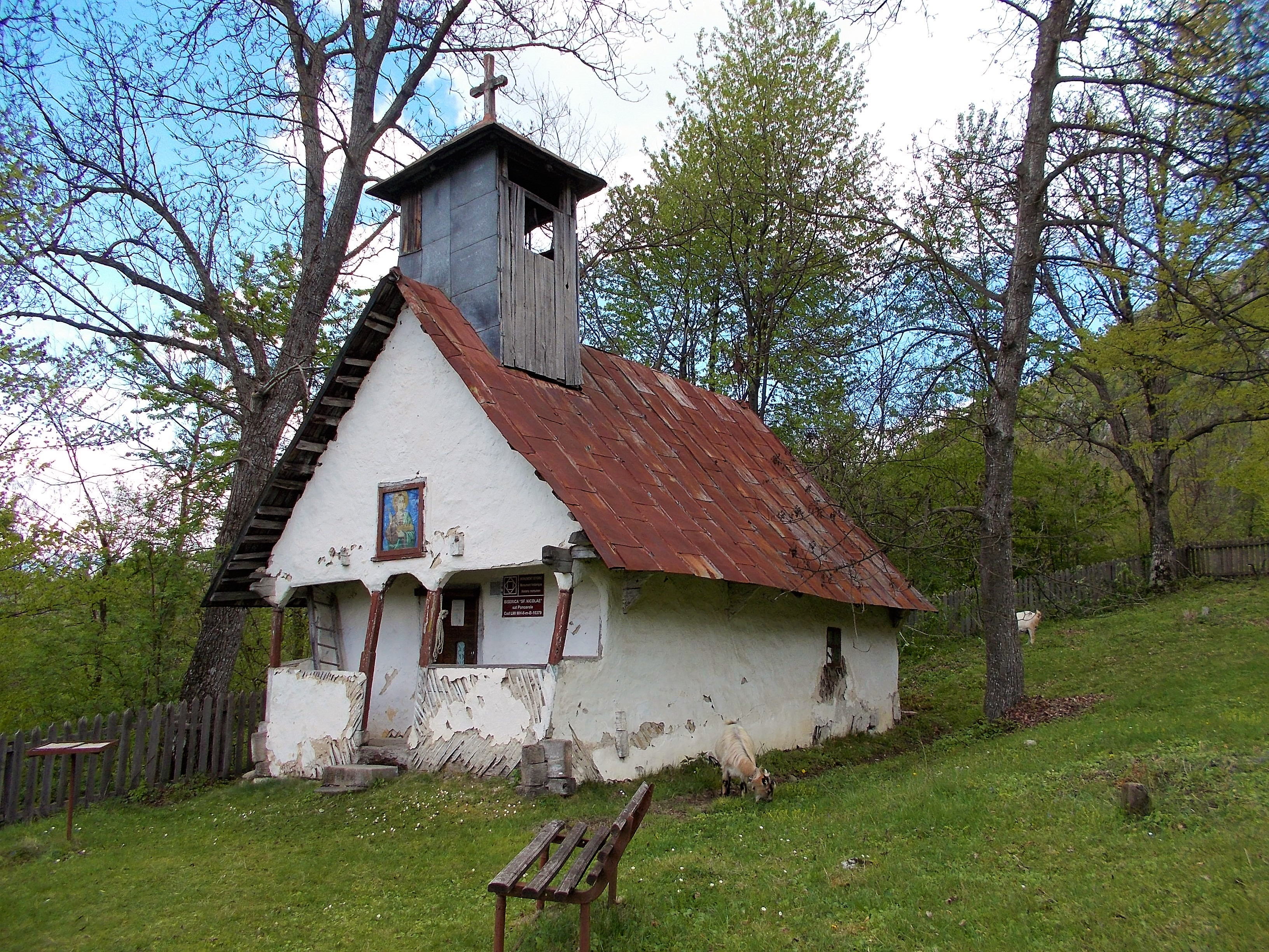 Biserica de lemn „Sf. Nicolae” din satul Ponoarele, județul Mehedinți